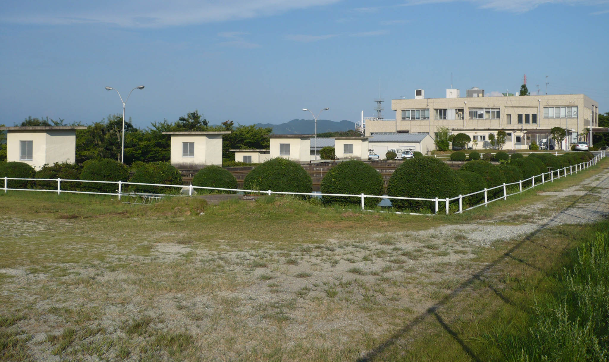 八幡山曲輪にある三木市の浄水場